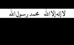 Banner der kurdisch-islamistischen Gruppierung Ansar al Islam (AAI).